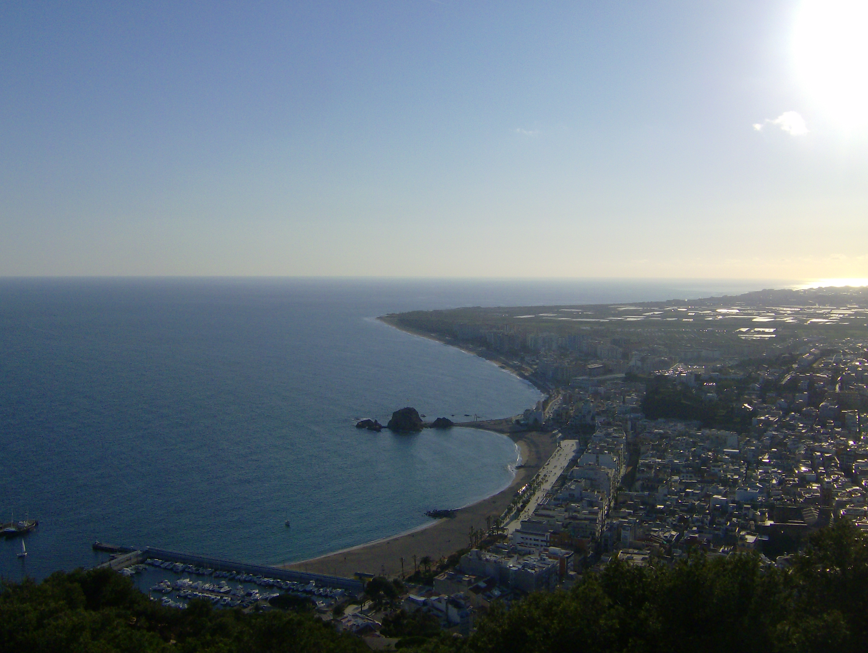 Vista de Blanes des del Castell de Sant Joan